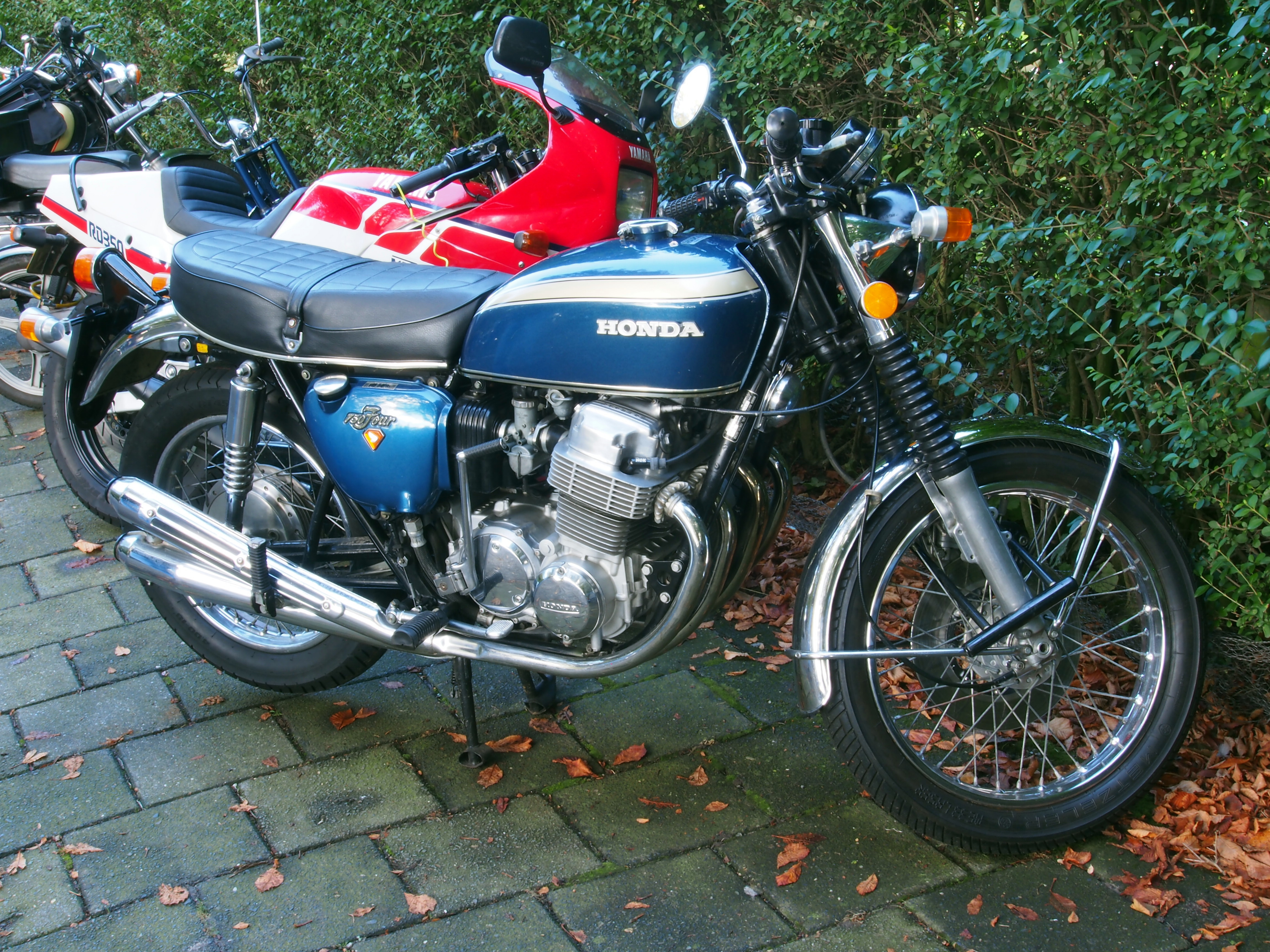 Blue Honda 750 Four.